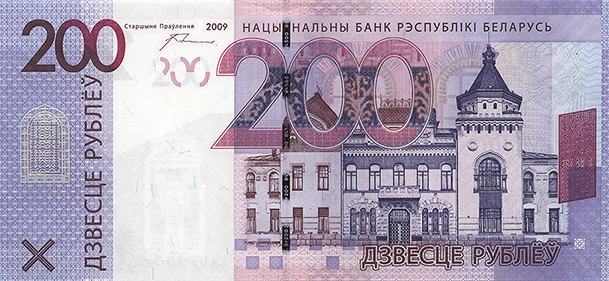 200 белорусских рублей образца 2009 года (лицевая сторона)